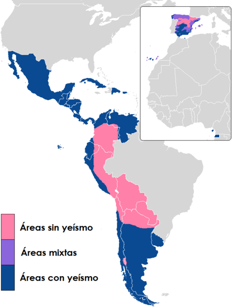 Yeísmo